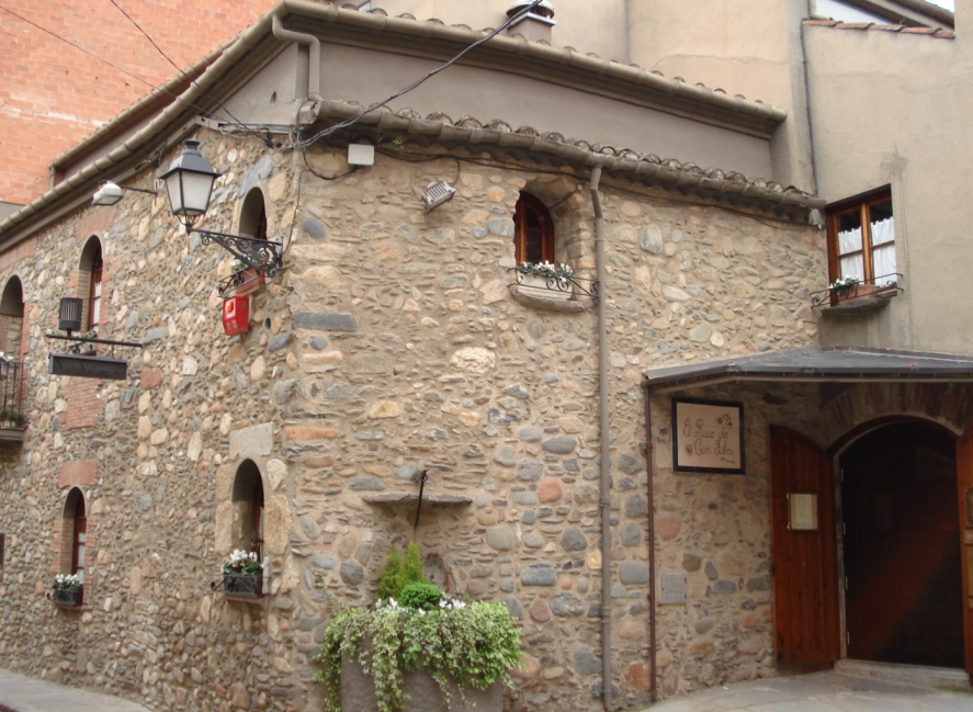 restaurant el raco de can fabes 3*** michelin